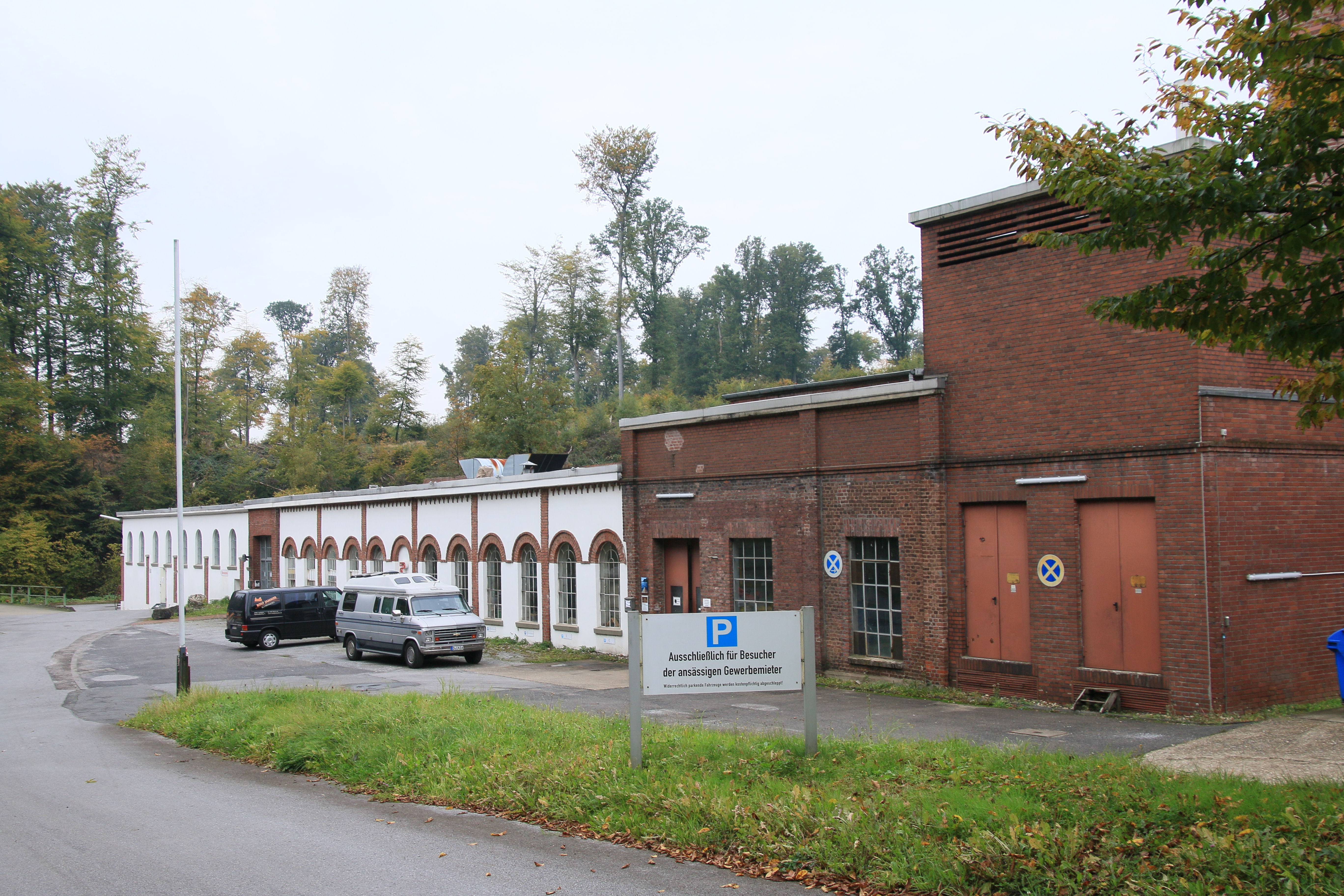 Papiermühlenweg 74